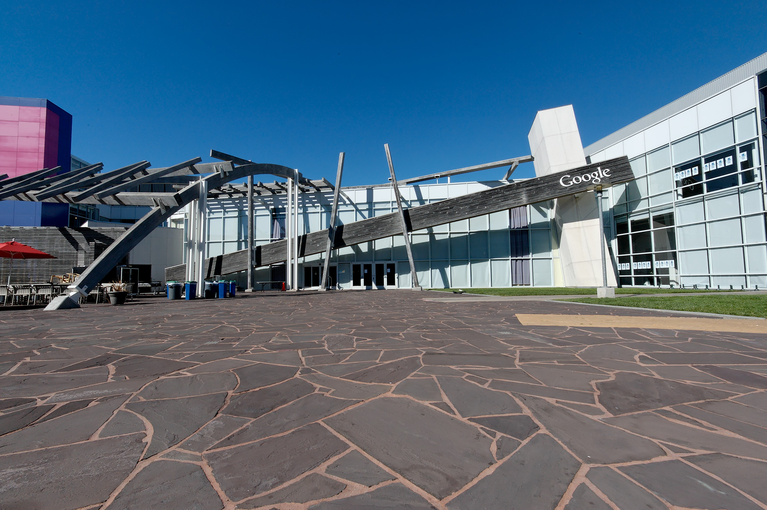 Google Campus